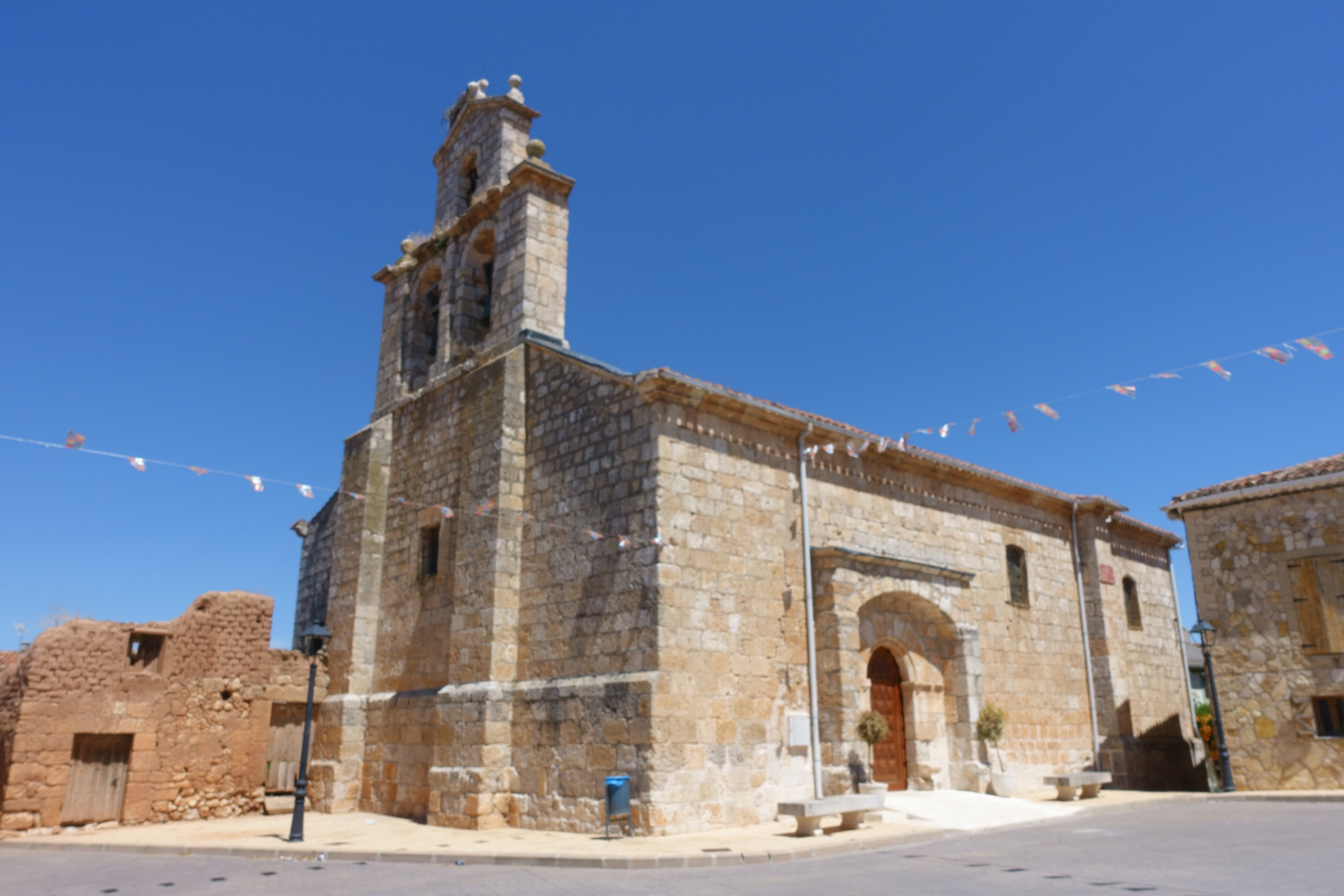 Iglesia de San Esteban Protomártir, en Torrepadre (Burgos, España).